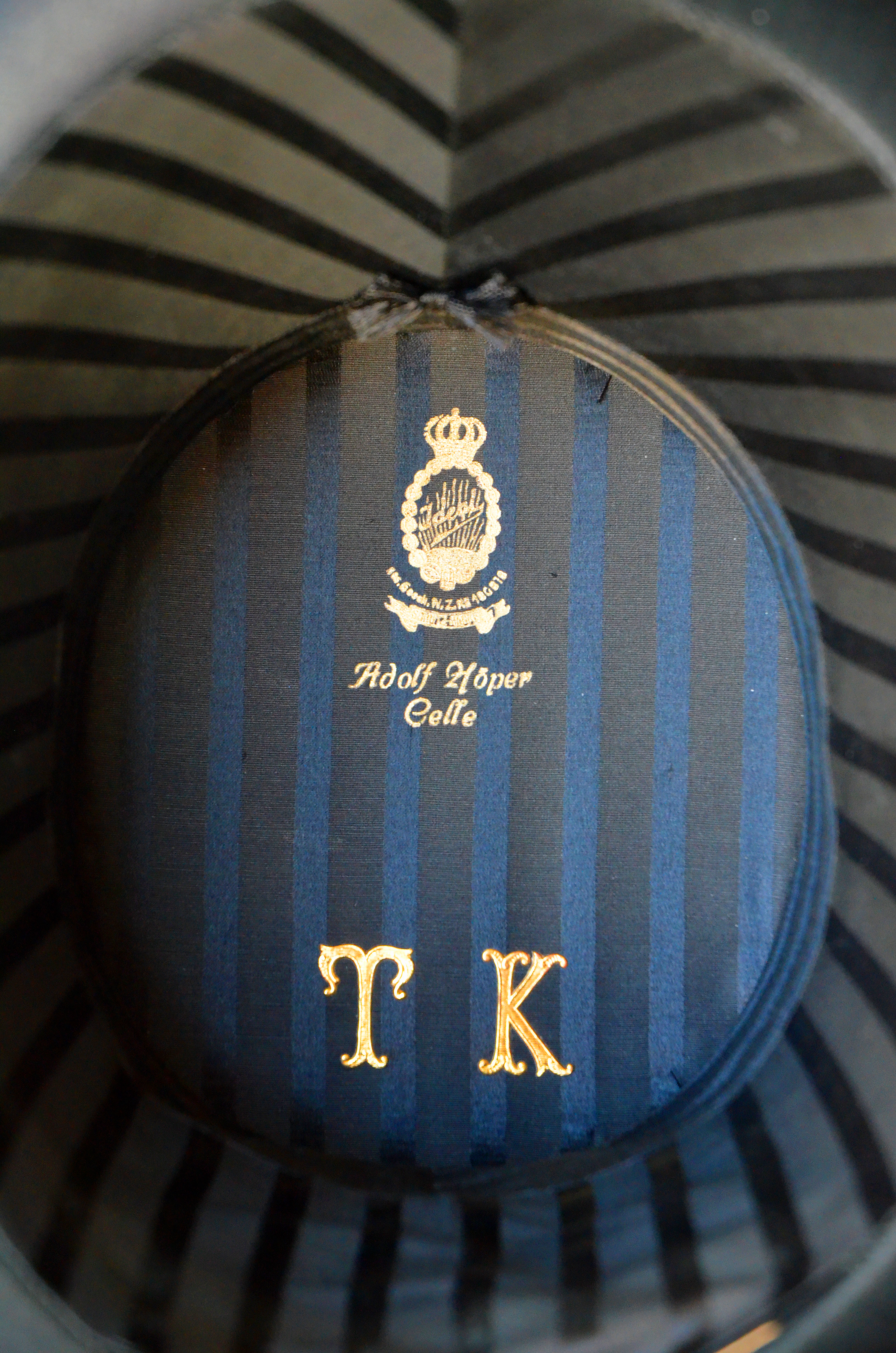 Am 31. März 2019 eröffnete der Pastor i.R. Michael Stier mit einer Rede die Ausstellung "Serie ROT" der Fotokünstlerin Ilse Paul im Kanzleicafé in Celle. Diese Fotografie zeigt das Innenfutter des mit den Initialen T K für den Musiker Theodor Krüger gekennzeichneten Zylinders aus der Hutfabrik des Kürschnermeisters Adolf Höper in Celle, Großer Plan 29. Die Künstlerin, eine Enkelin von Theodor Krüger, trägt diesen Zylinder ihres Großvaters bei besonderen Anlässen als ihr Markenzeichen. Der Hutboden trägt das Emblem für die gekrönte Marke Ideal als gesetzlich geschützes Warenzeichen mit eingetragener Nummer ...